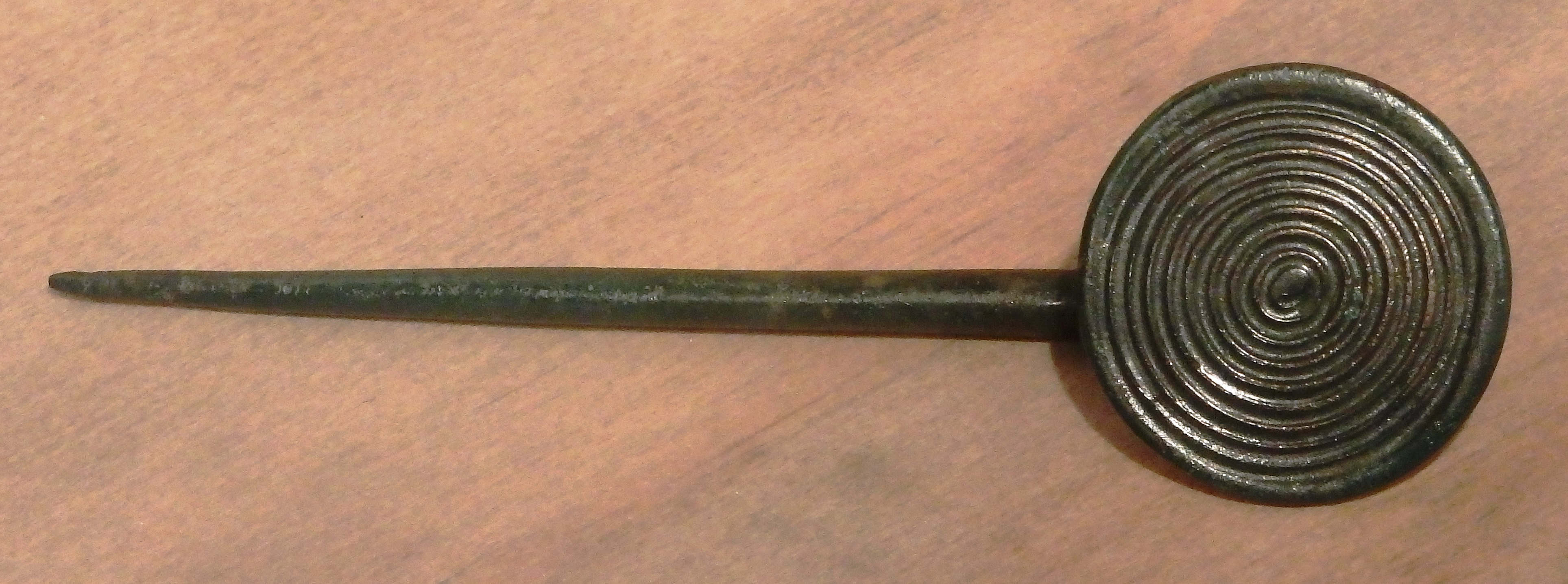 Scheibenknopfnadel mit Sonnensymbol (?), Jüngere Bronzezeit, Fundort Kröß (Holstein), Museum zeiTTor (Neustadt/Holstein)